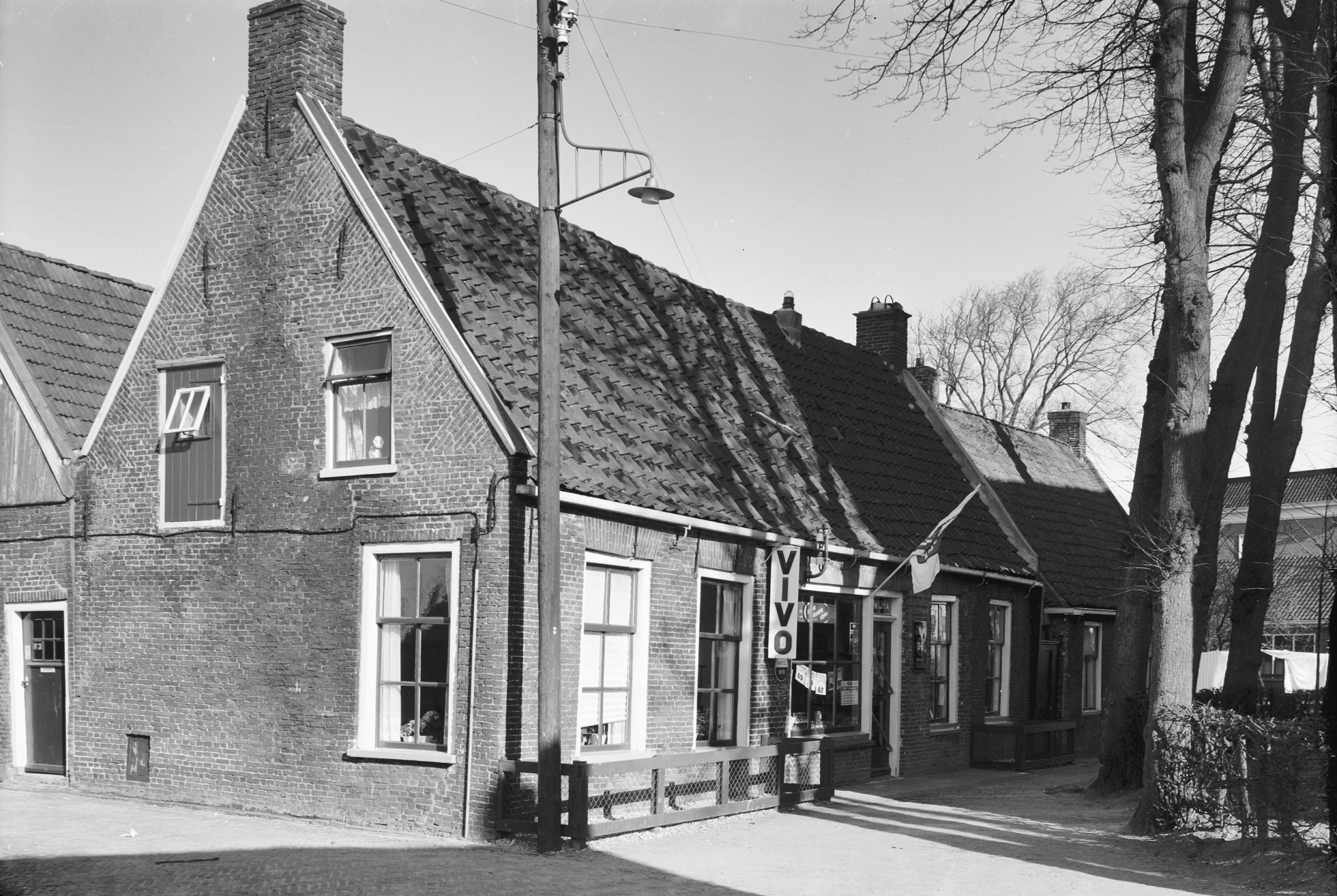 Diversen, Boerderijen: G.222, aanzicht